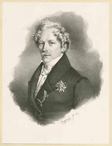 Maximilian von Arco-Valley (1806-1875), bayerischer Graf und Politiker